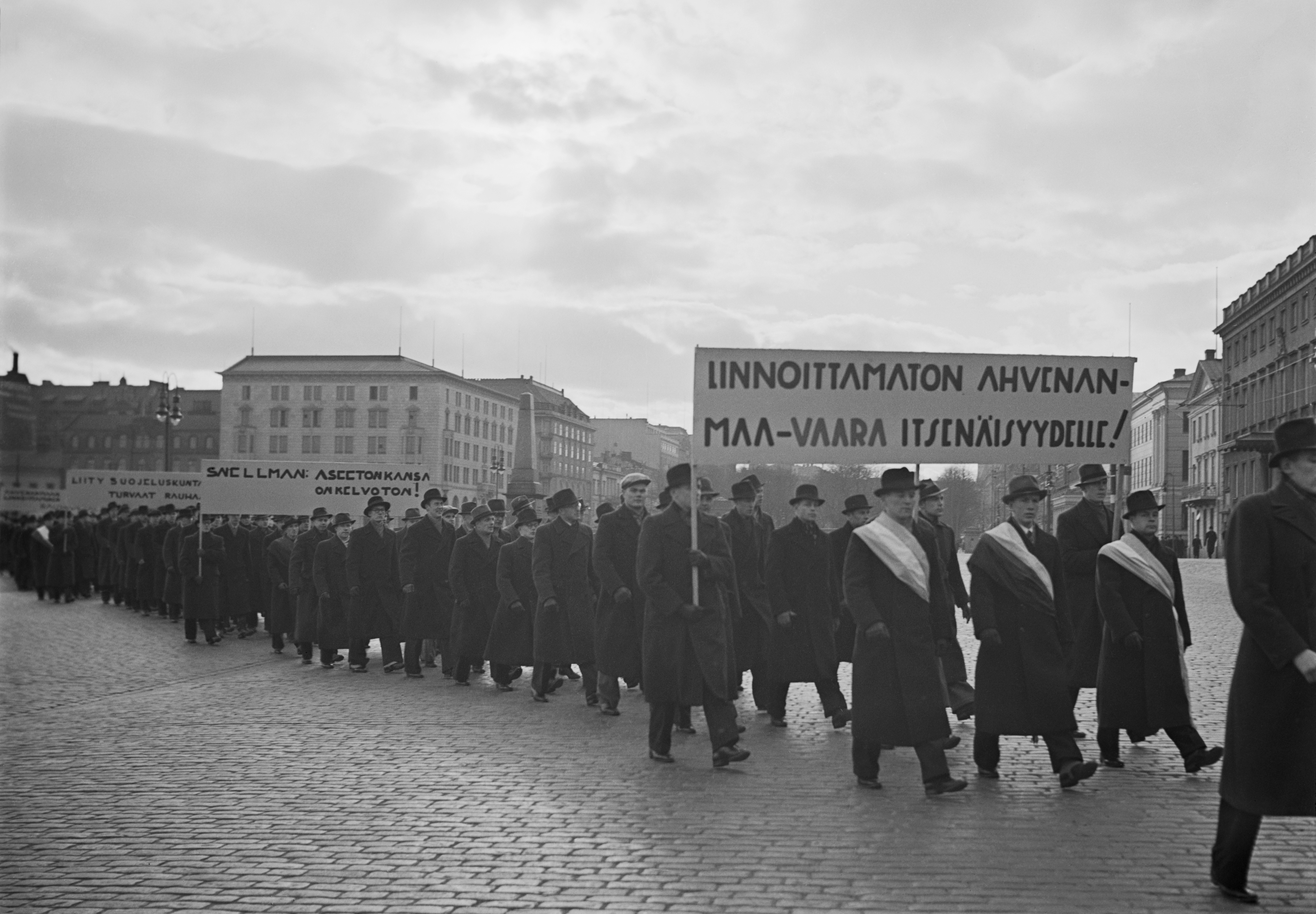 Mielenosoituskulkue Kauppatorilla Helsingissä vaatimassa sotilaallista varustautumista sekä vastustamassa Ahvenanmaan demilitarisoinnin jatkamista vuonna 1938